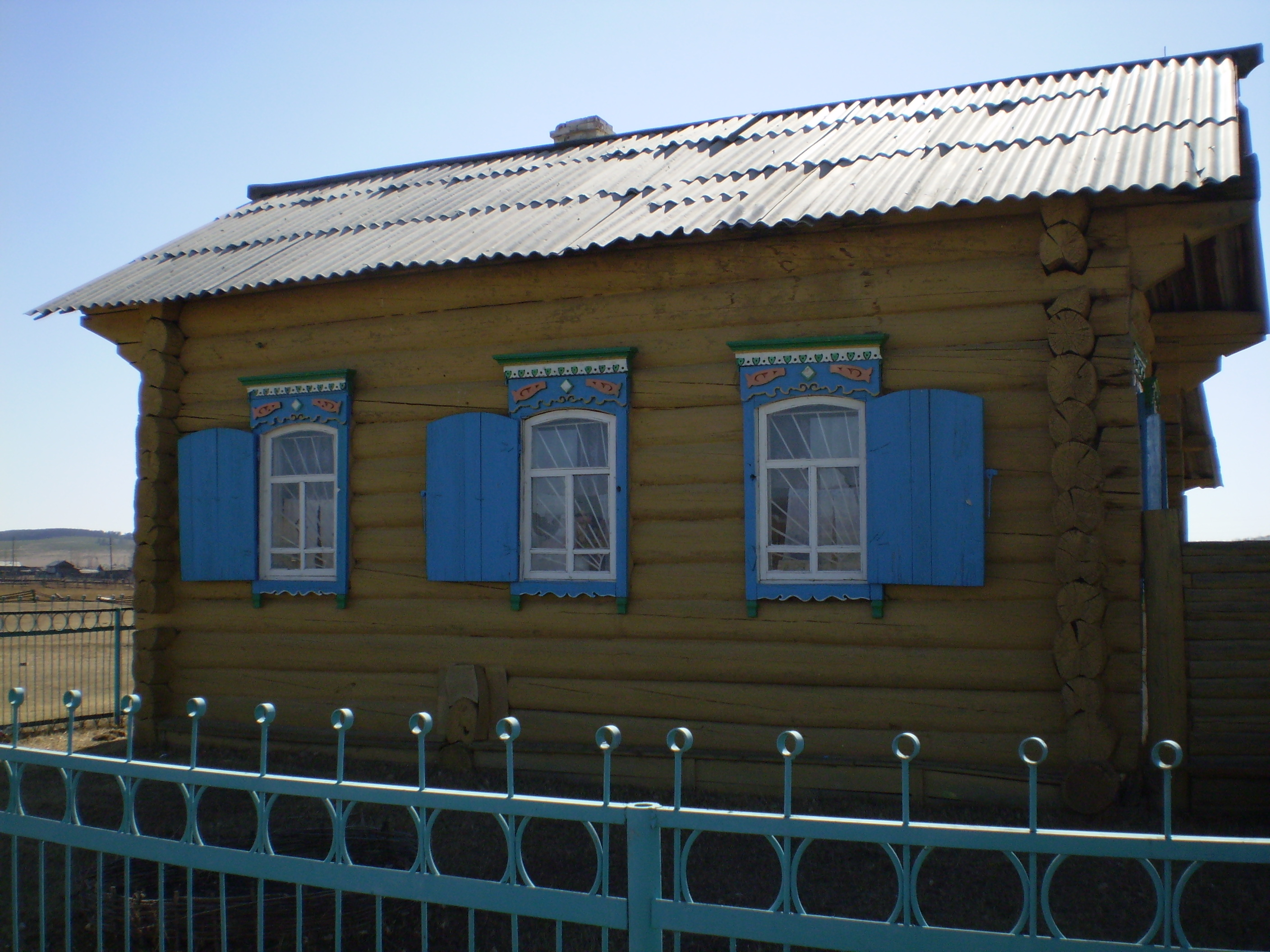 Дом-музей И. К. Калашникова в селе Шаралдай Мухоршибирского района Бурятии.